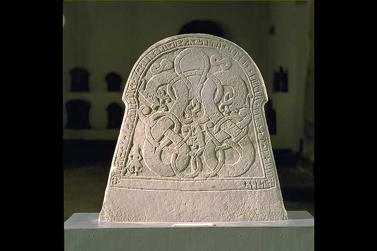 Ena sidan (A). Inskriften på denna sida lyder: Ottar och Gairvat och Aivat de satte stenen efter Liknat , sin fader. Motiv: G113 Ardre kyrka 3 Kategori: Runristning/runstenEna sidan (A). Inskriften på denna sida lyder: Ottar och Gairvat och Aivat de satte stenen efter Liknat , sin fader.